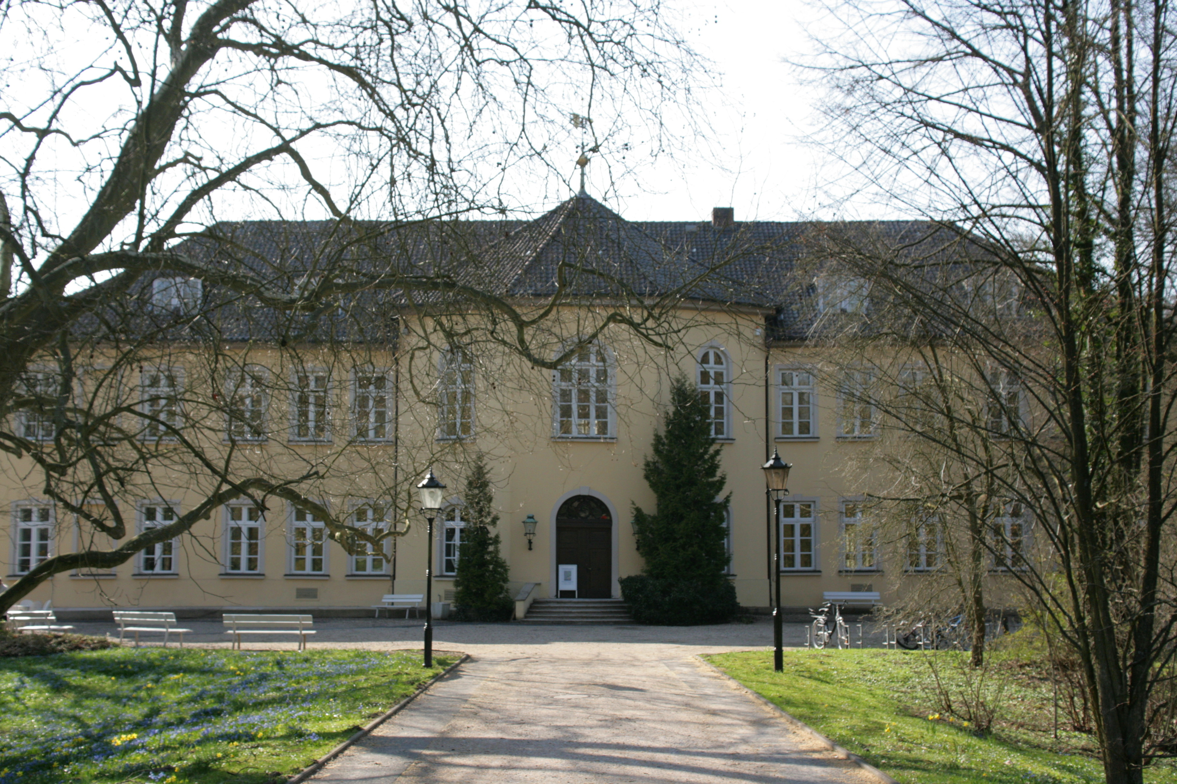 Schloss Holdenstedt, Schloßstraße 4 in Holdenstedt, Uelzen